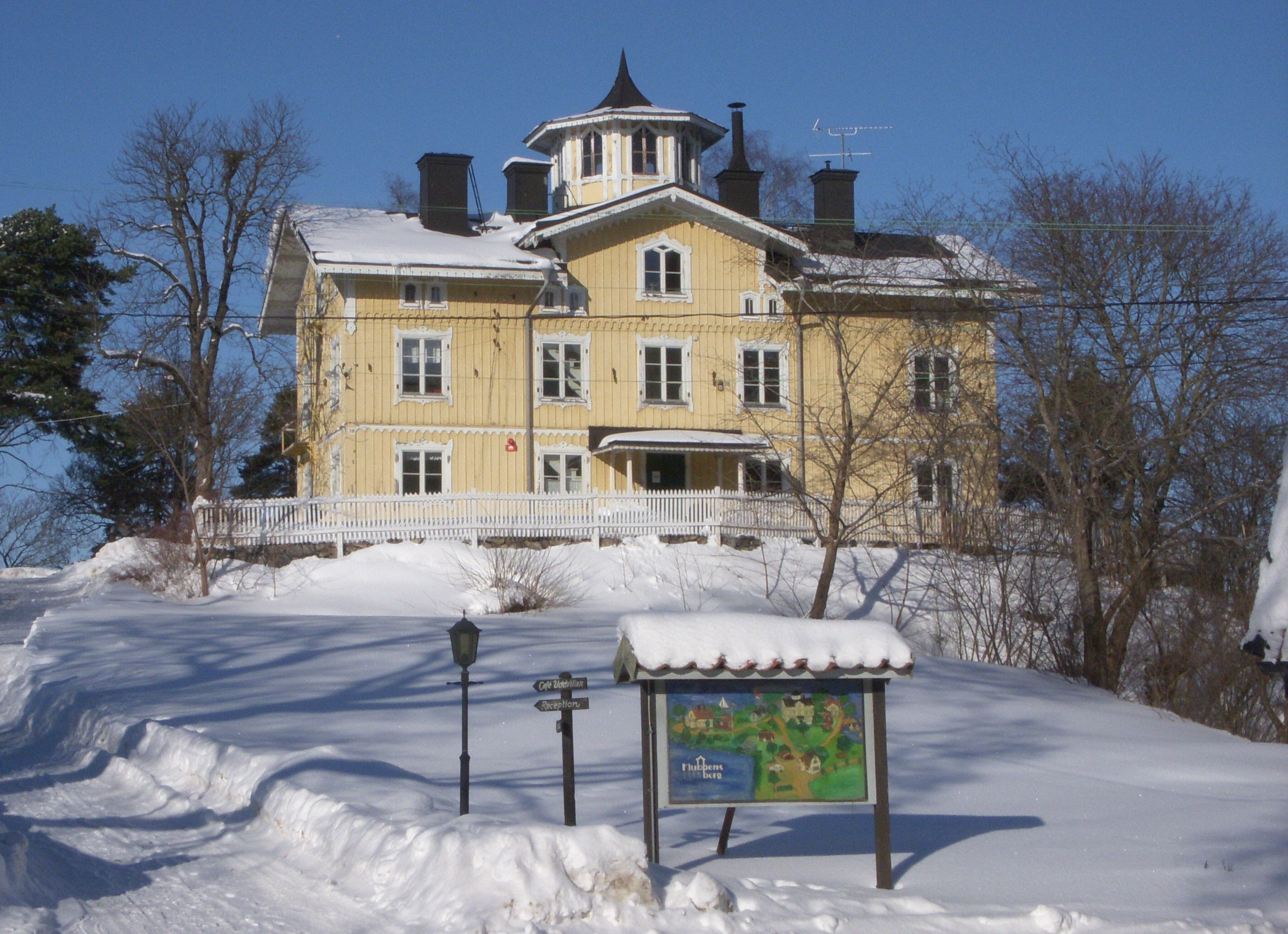 Tornvillan, Klubbensborg, Mälarhöjden, Stockholm